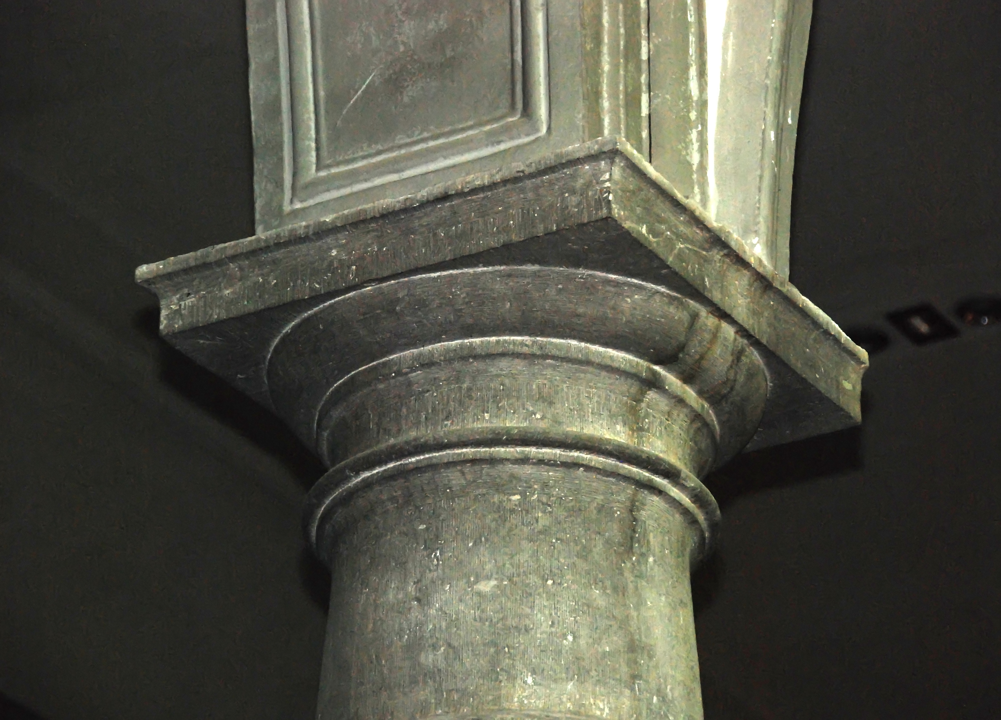 Belgique - Brabant wallon - Église de Court-Saint-Étienne